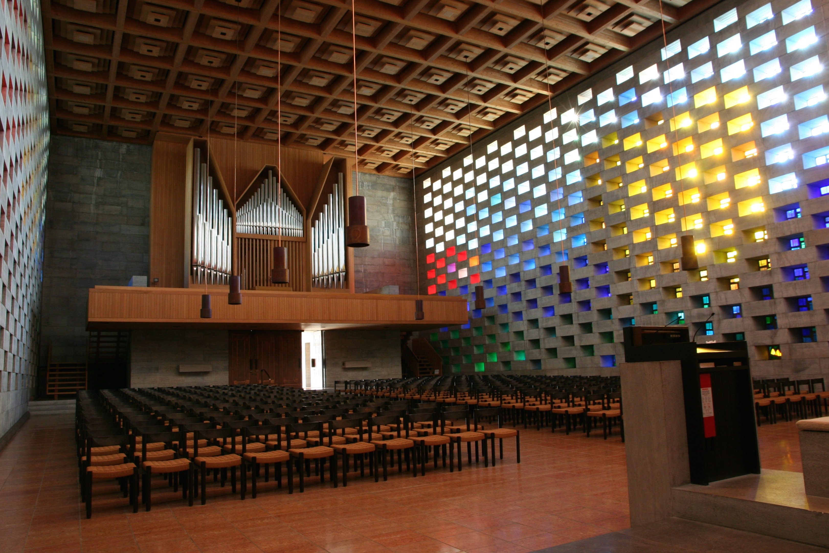 Krematorium Nordheim Zürich